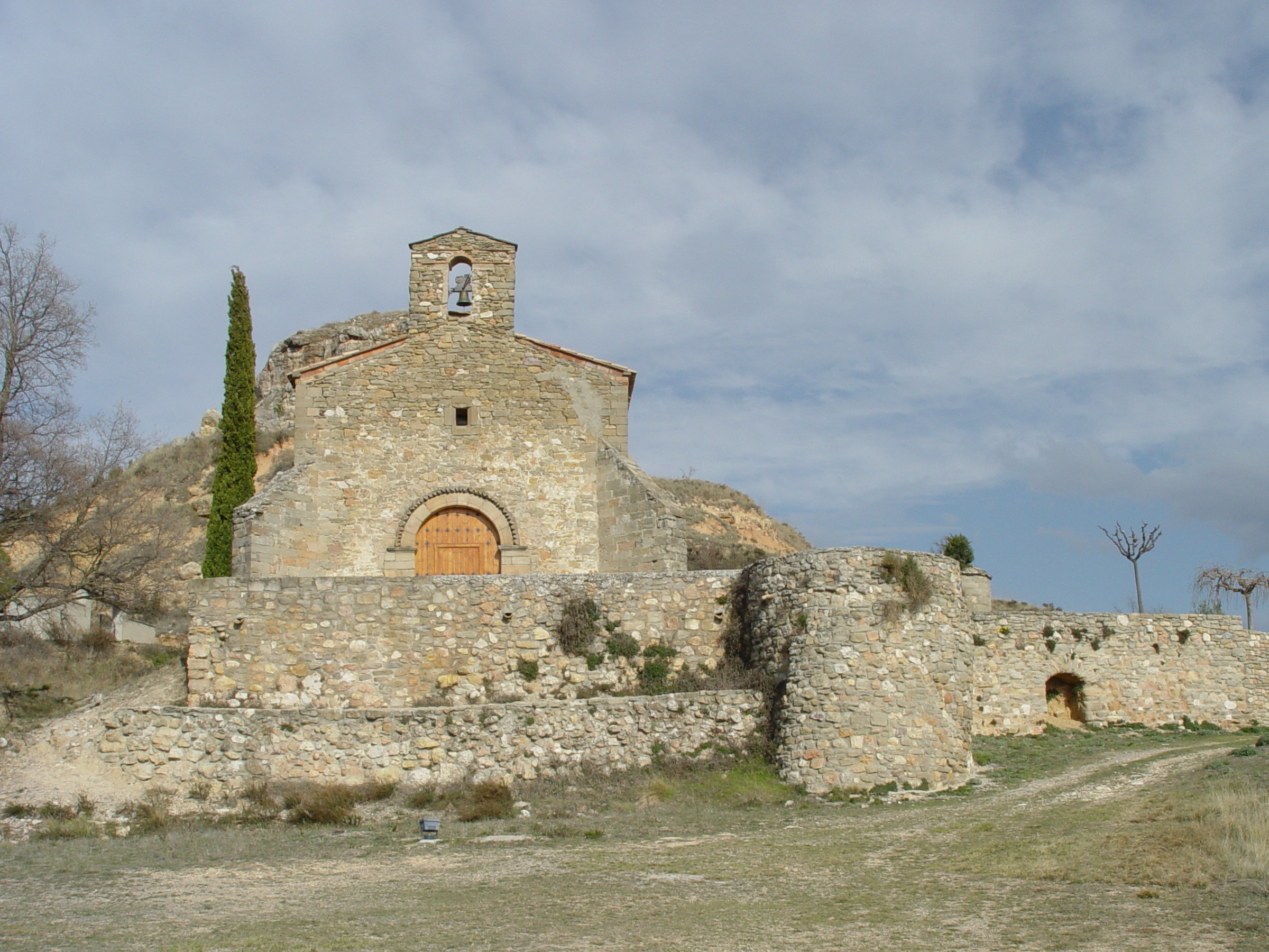 Ermita de la Verge d'Obac de Viacamp (la Ribagorça)